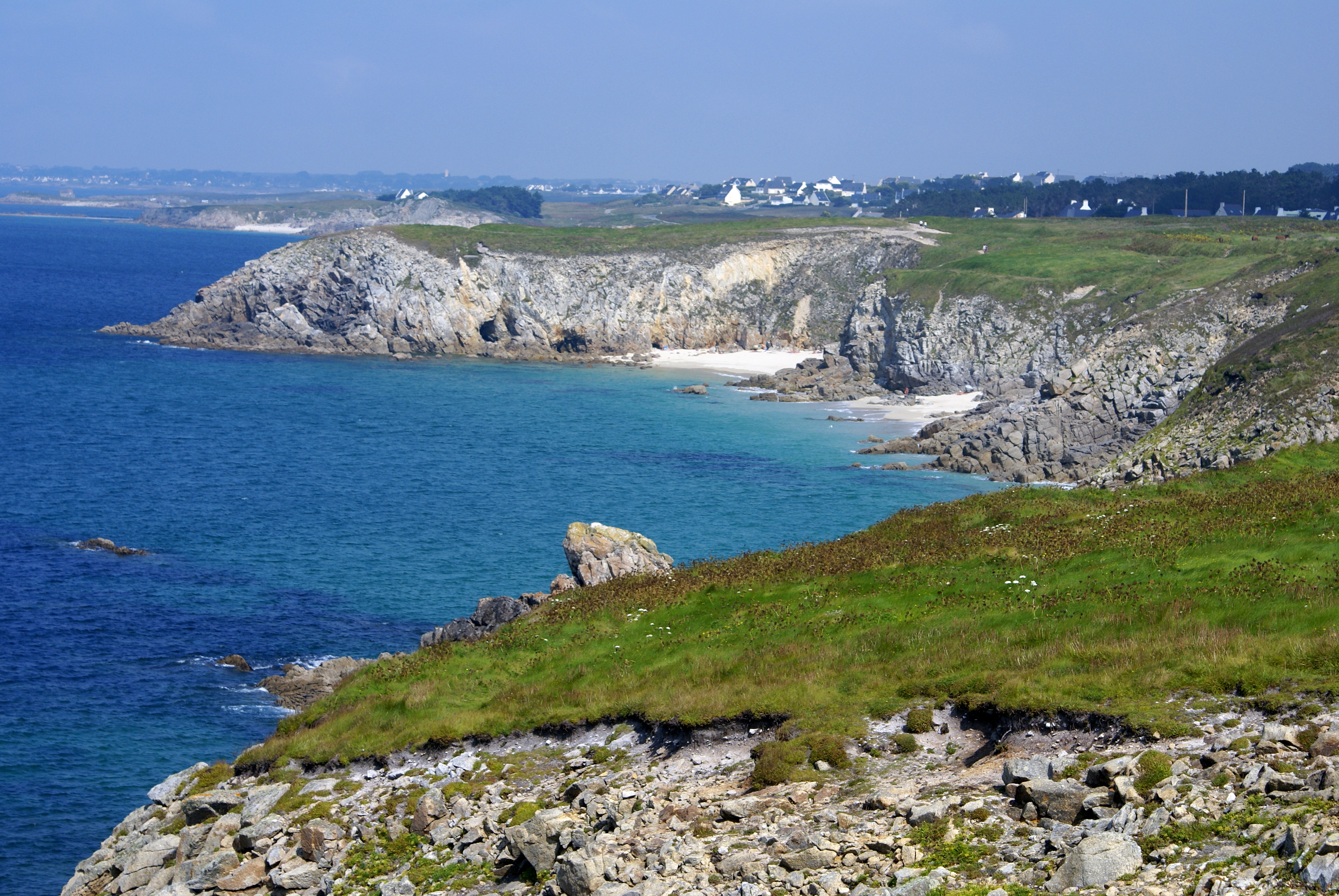 Vue de la cote depuis la pointe de Corsen en Bretagne